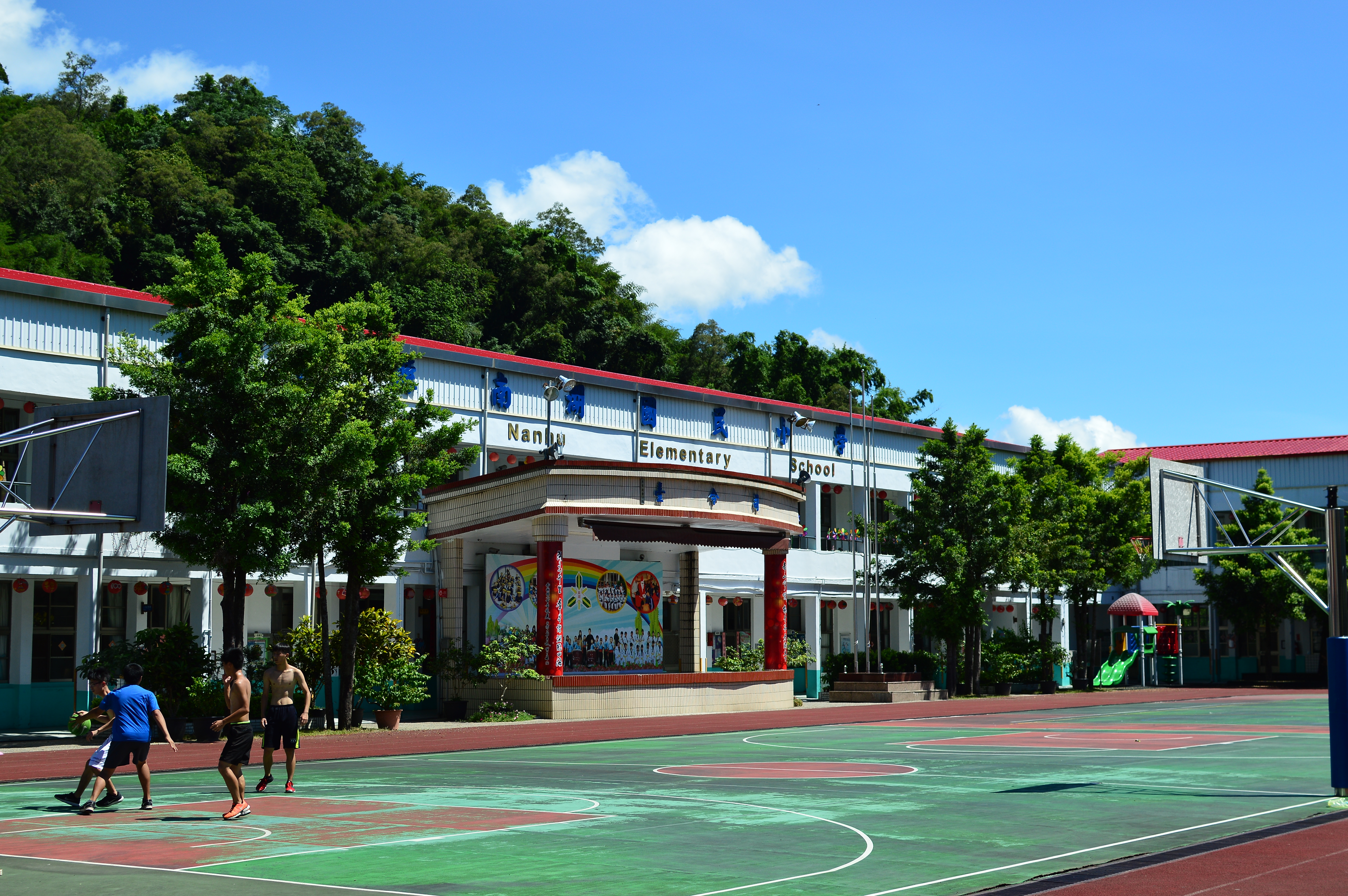 苗栗縣大湖鄉南湖國民小學2017